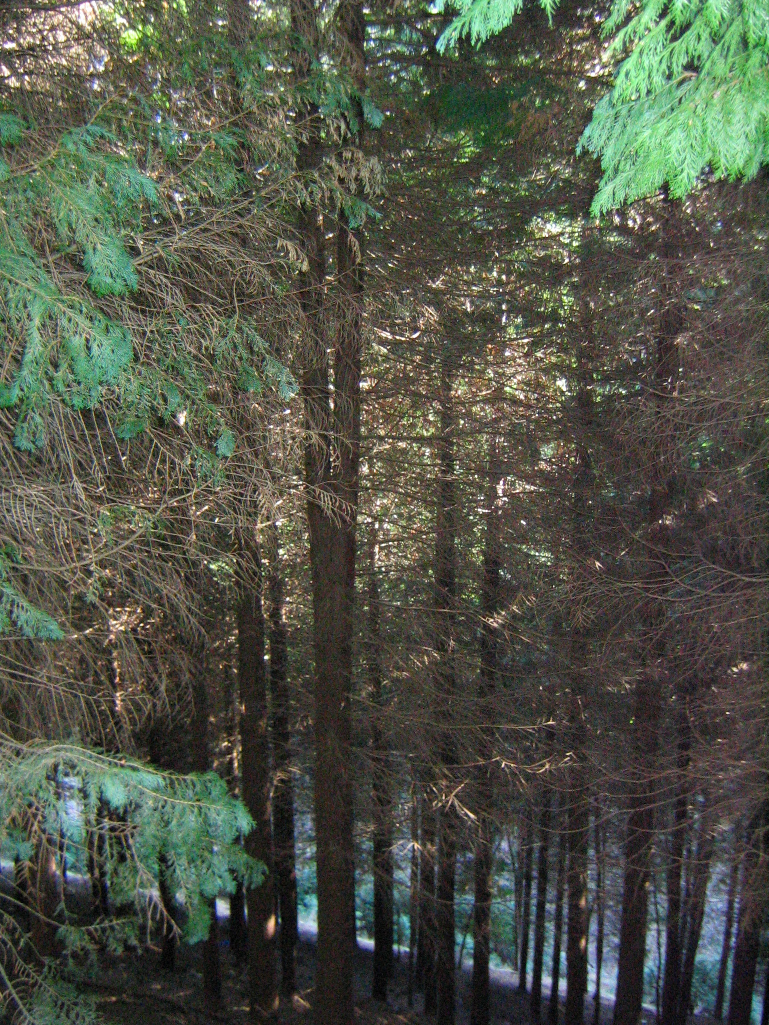 Plantación de cipreses de Lawson en el Parque Natural de Urkiola en Bizkaia, País Vasco (España).